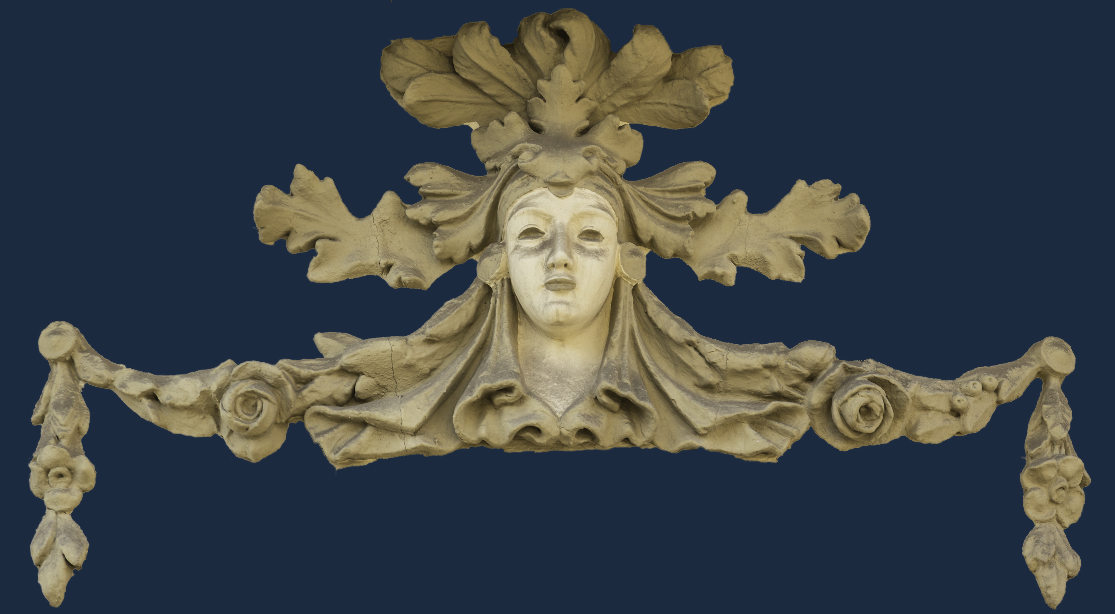 Los Grandes Almacenes La Reconquista es uno de los mejores exponentes del modernismo en Melilla, está ubicado en la Plaza Menéndez Pelayo y forma parte del Conjunto Histórico Artístico de la Ciudad de Melilla, un Bien de Interés Cultural.